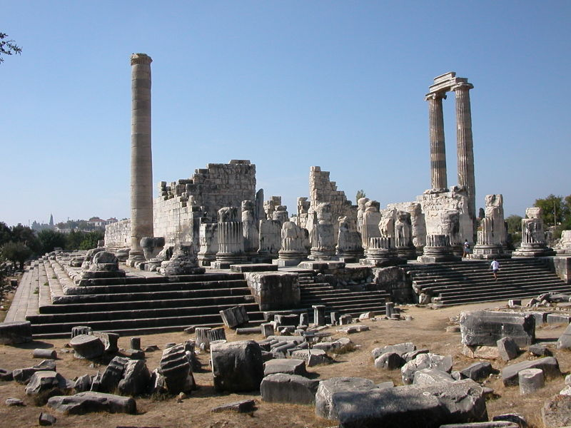 Het Didymaion